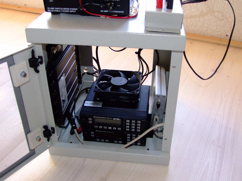 Eigenbau Amateurfunkrelais mit kommerziellen Einzelkompomenten Hier verwendet in der Relaisstation DM0TMH Trautmannshofen